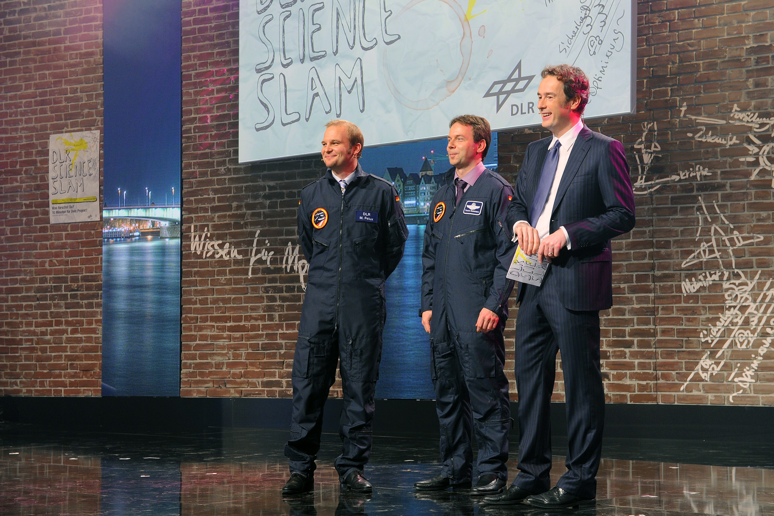 Impressionen DLR-Jahreshauptversammlung 2012 - Finale DLR_Science_Slam, Finalisten Thomas Dautermann (mitte) und Michael Felux mit Moderator Normen Odenthal (re.)